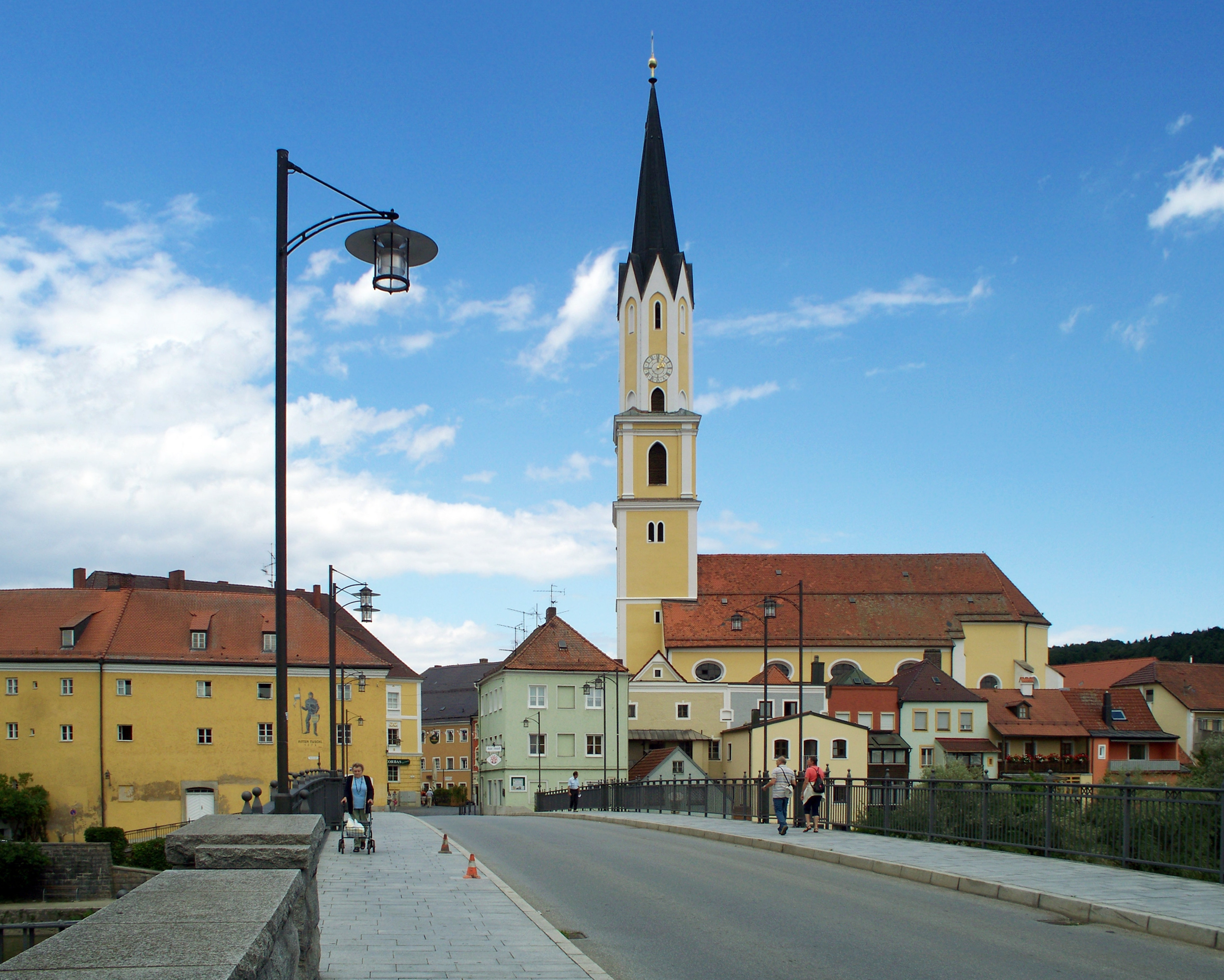 Boarisch: D'Vejsbrugg mid da Stådtpfarrkirchn vo Väishof a da Doana.